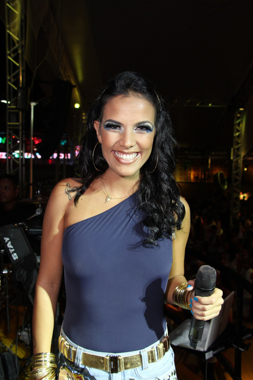 A ex-participante do The Voice Brasil Ju Moraes.